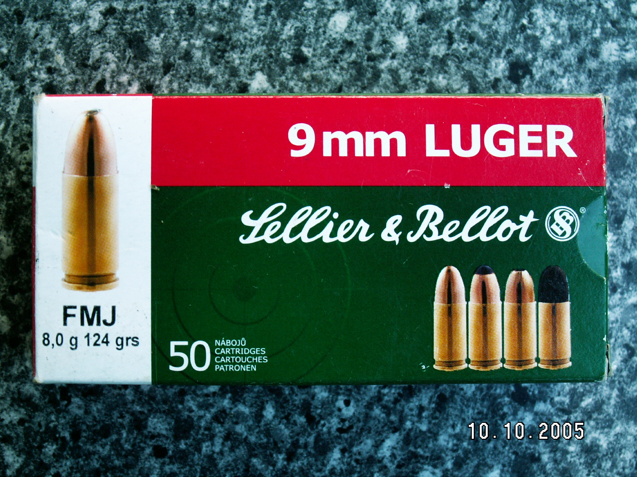 Škatla za strelivo 9 mm Luger oz. 9x19 mm Parabellum